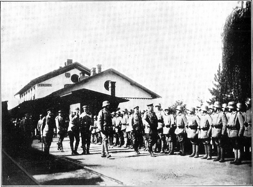 Wilhelm II. besichtigt das Bataillon auf der Durchfahrt von Munkács